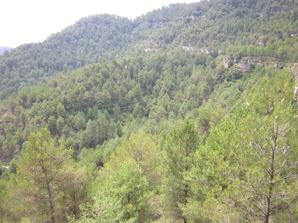 El torrent del Coll de Portella (Monistrol de Calders, Moianès)